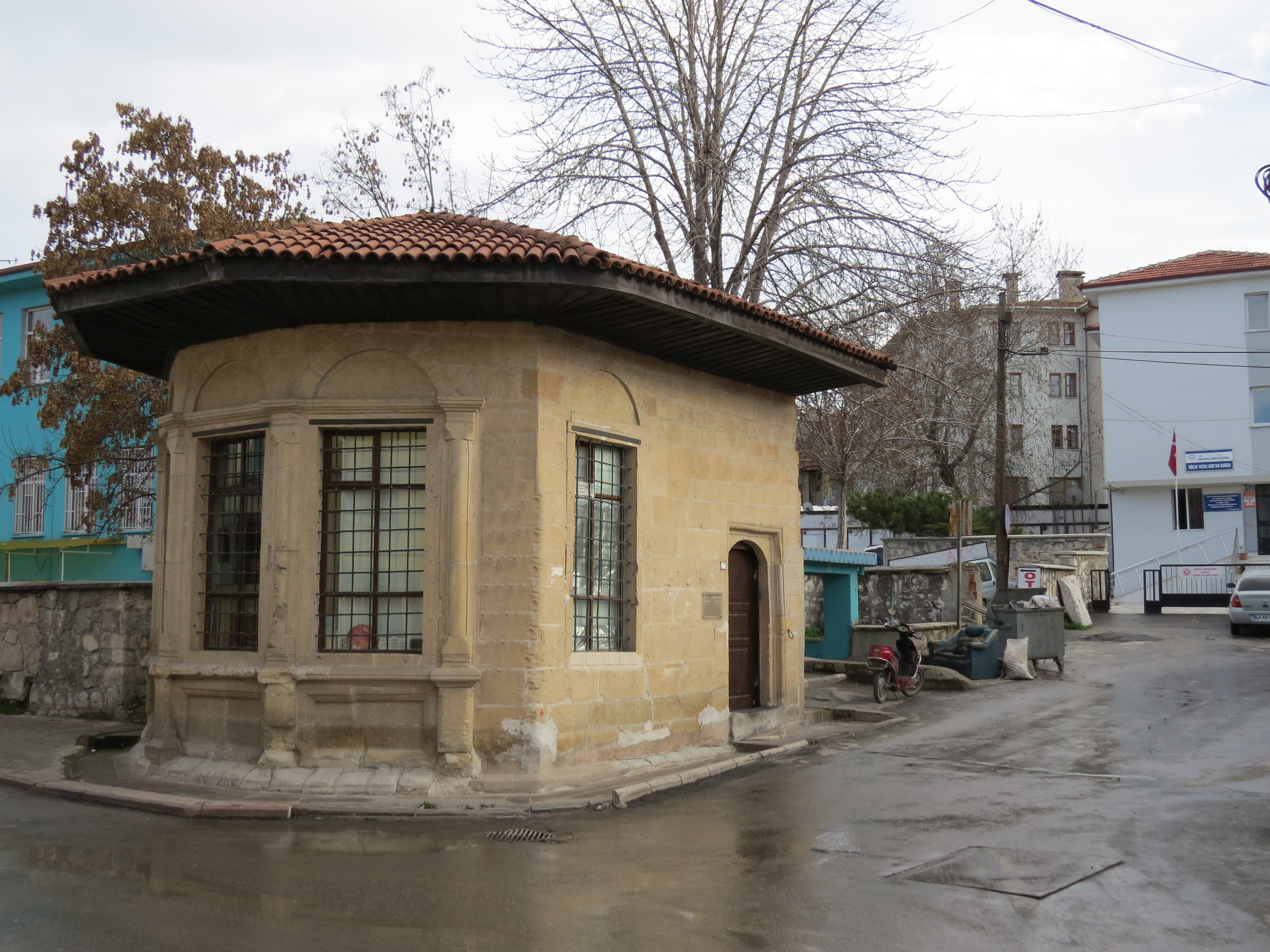 kütahya muvakkithânesi